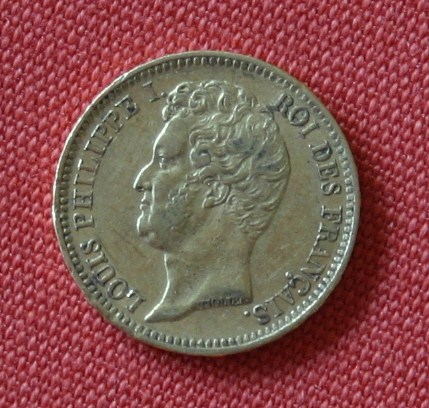 Goldmünze 20 Francs 1831 mit Louis Philippe engraver: N.P. Tiolier